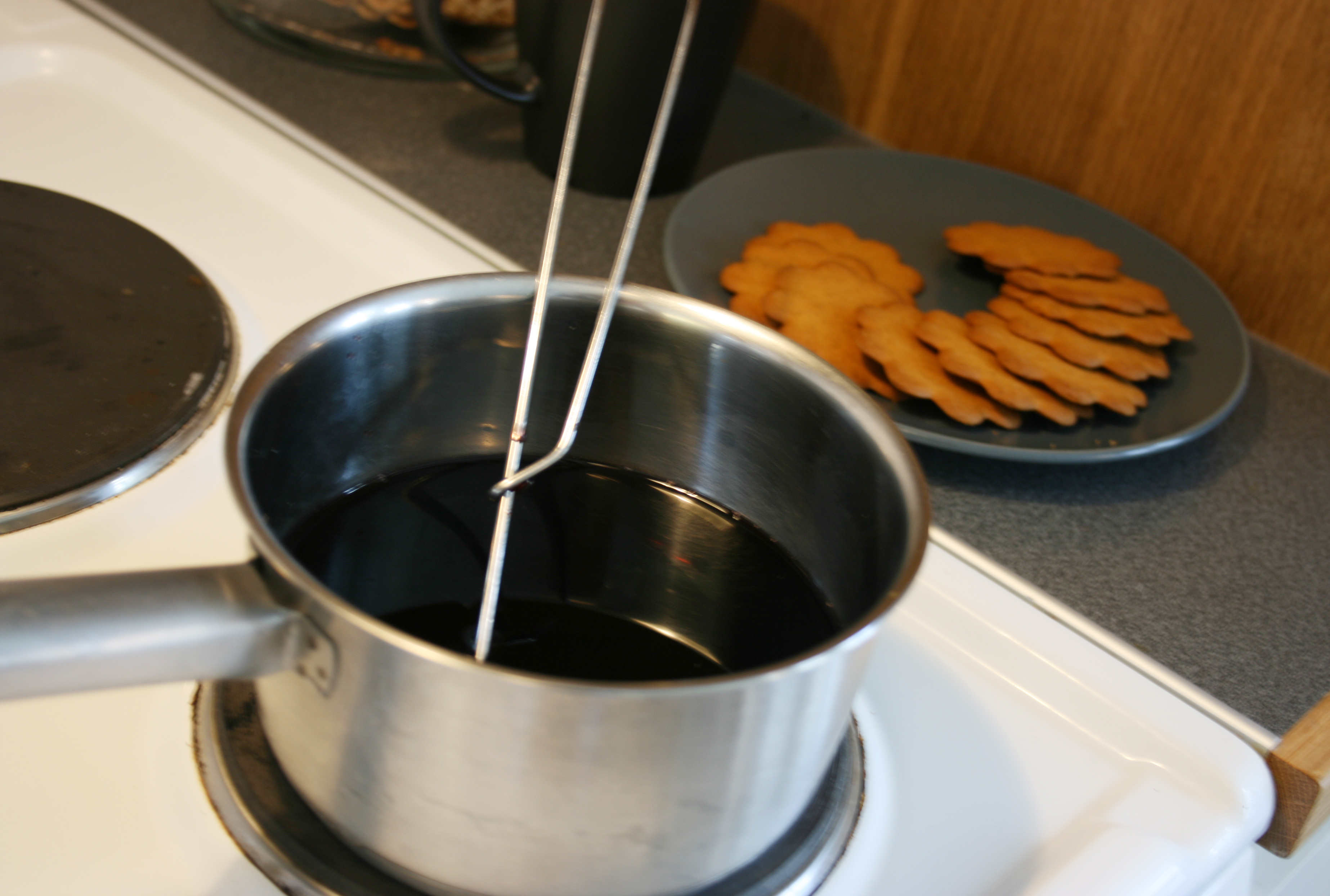 Glögg (Glogg)